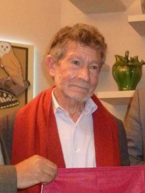 La bandera madrileña ondeará en el Dhaulagiri si el alpinista abulense Carlos Soria, que parte en marzo, hace cumbre en el único ochomil que le falta. Esta tarde el coordinador general de Alcaldía, Luis Cueto, ha hecho entrega de la enseña madrileña a Soria en el transcurso de un coloquio en el Gabinete de Historia Natural, en el que han participado además el embajador de Nepal, Bharat Rayamajhi, y el periodista y naturalista Luis Miguel Domínguez. El Dhaulagiri es con sus 8.167 metros la séptima cima más alta del planeta y fue escalado por primera vez en 1960 por una expedición suizo austriaca.